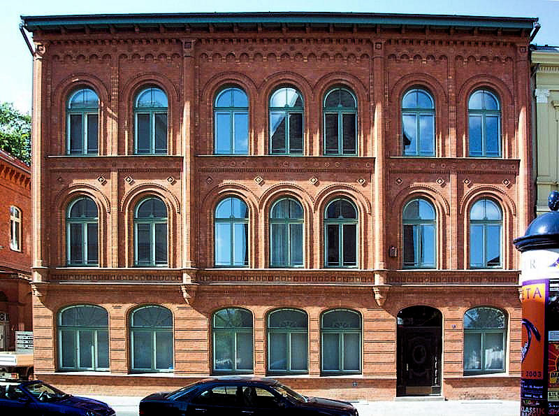 Klassizistische Klinkerfassade in der Schwaanschen Straße